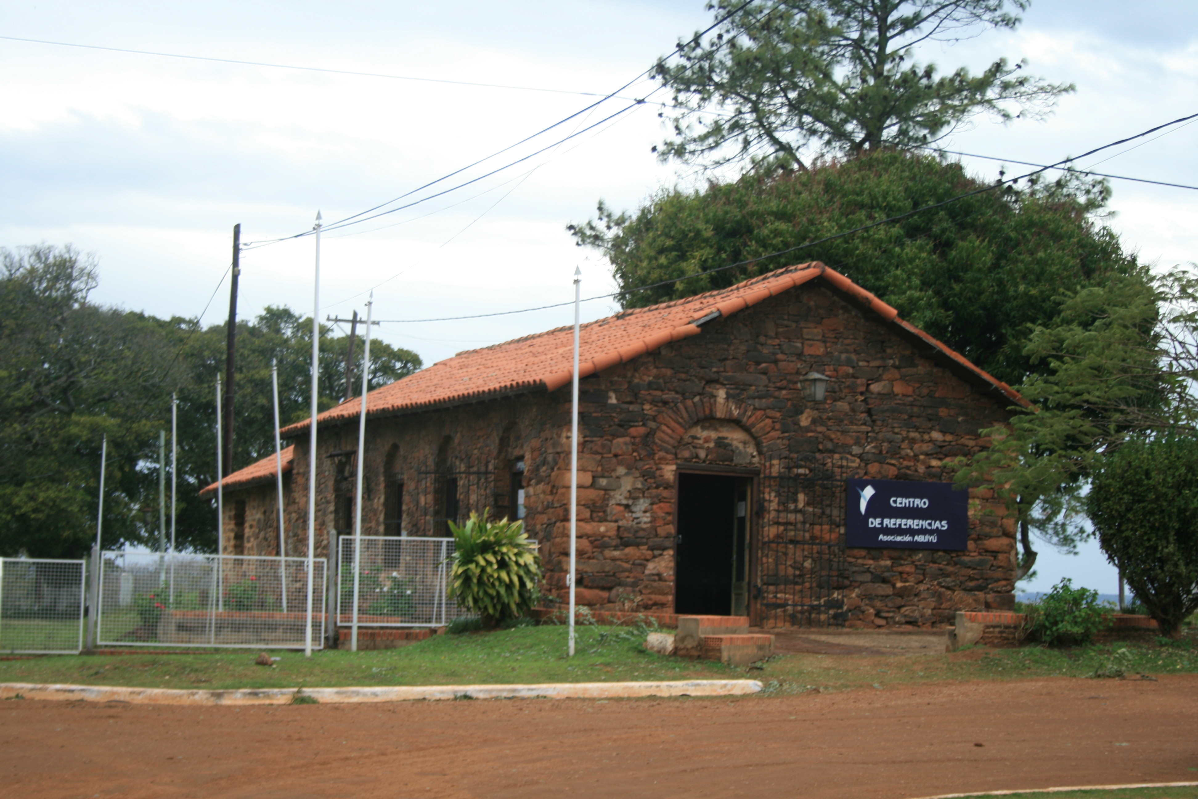 Misión Jesuítica de Yapeyú. Centro de Referencias.